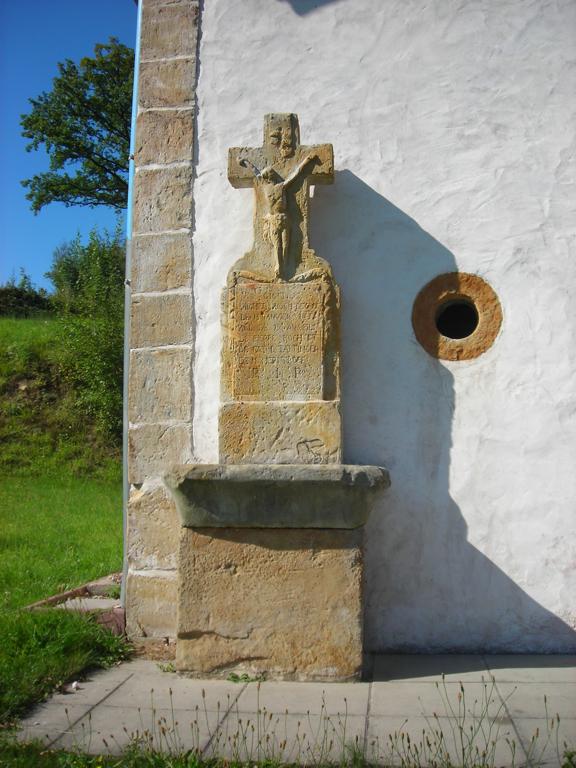 Calvaire adossé à la chapelle de Bisten-en-Lorraine (Moselle, France)